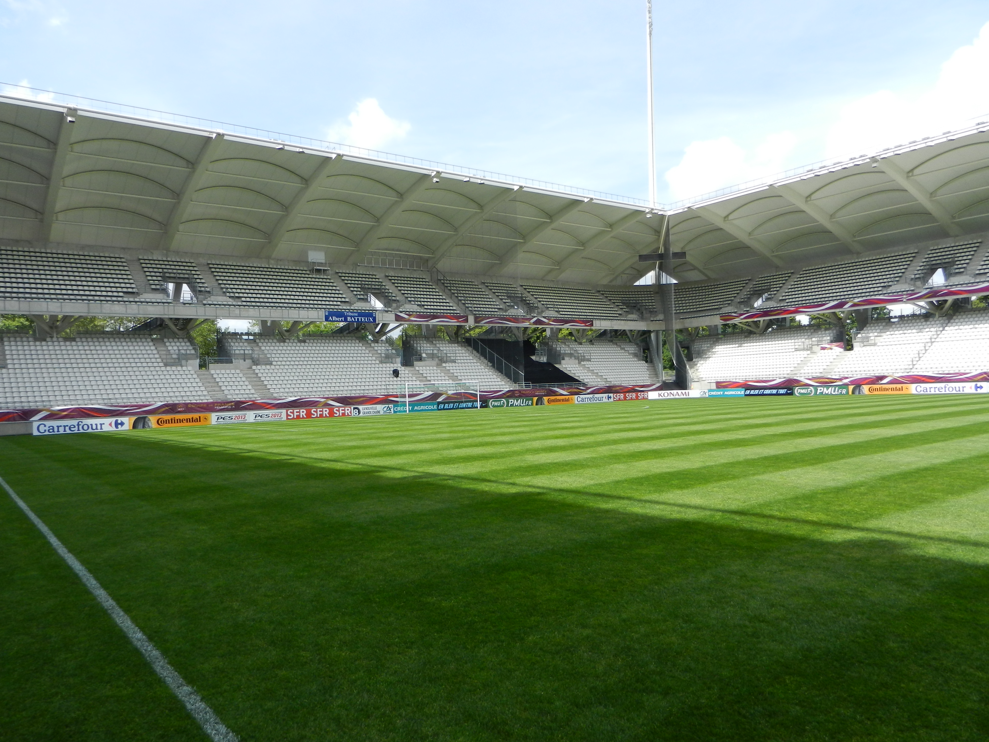 Avant match France-Norvège féminin